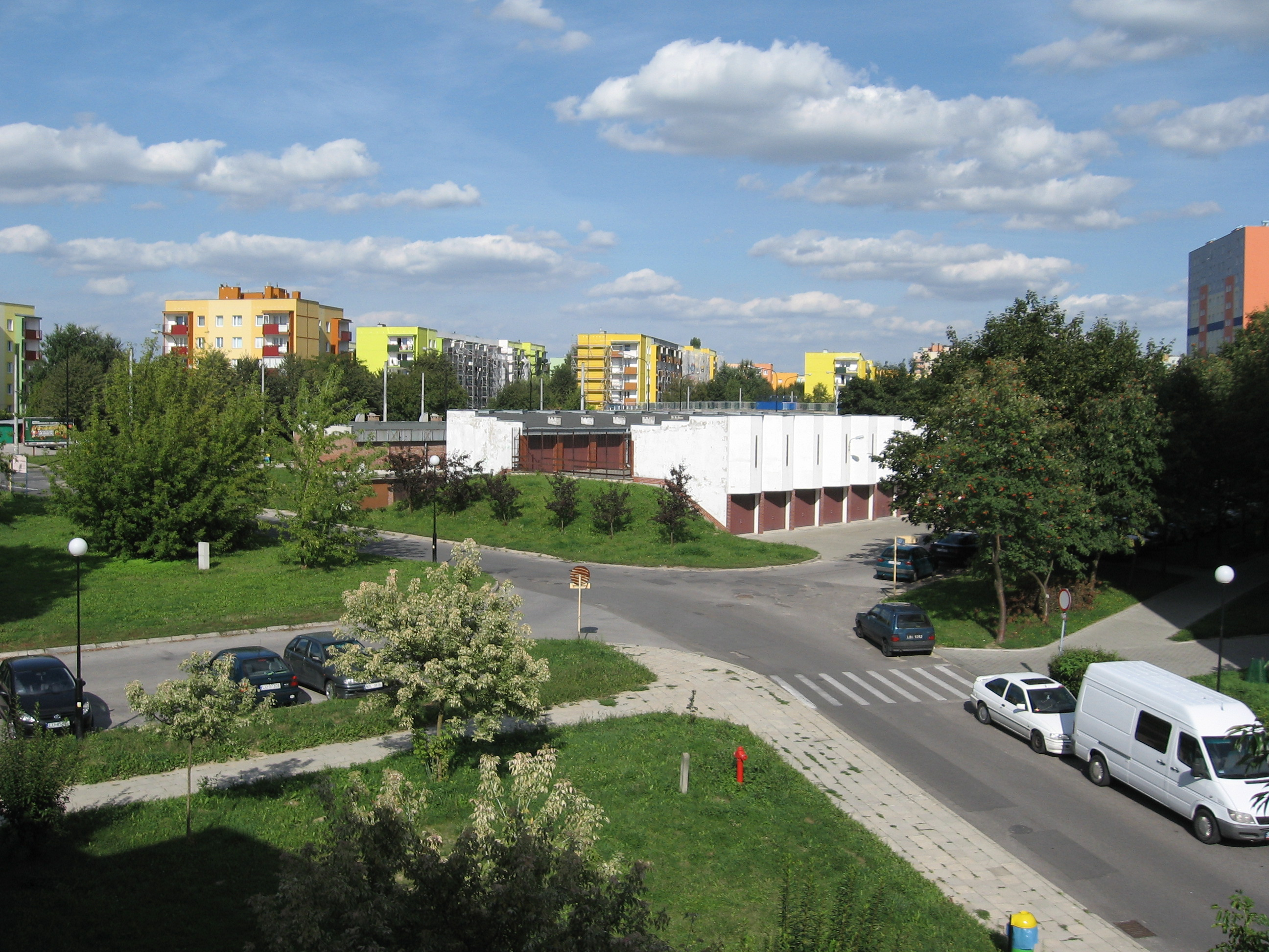 Osiedle Łęgi - lato